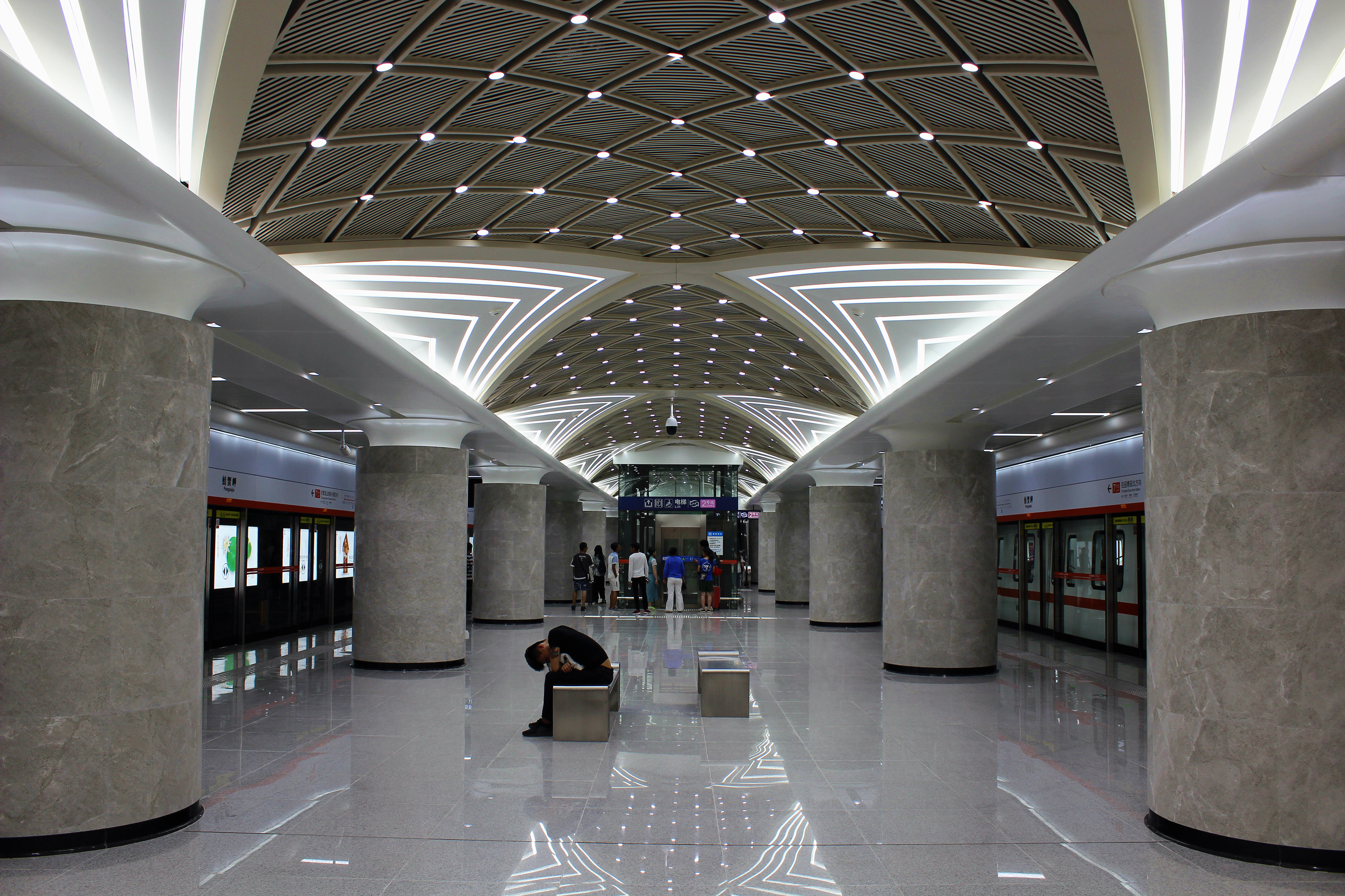 武汉地铁7号线螃蟹岬站站台